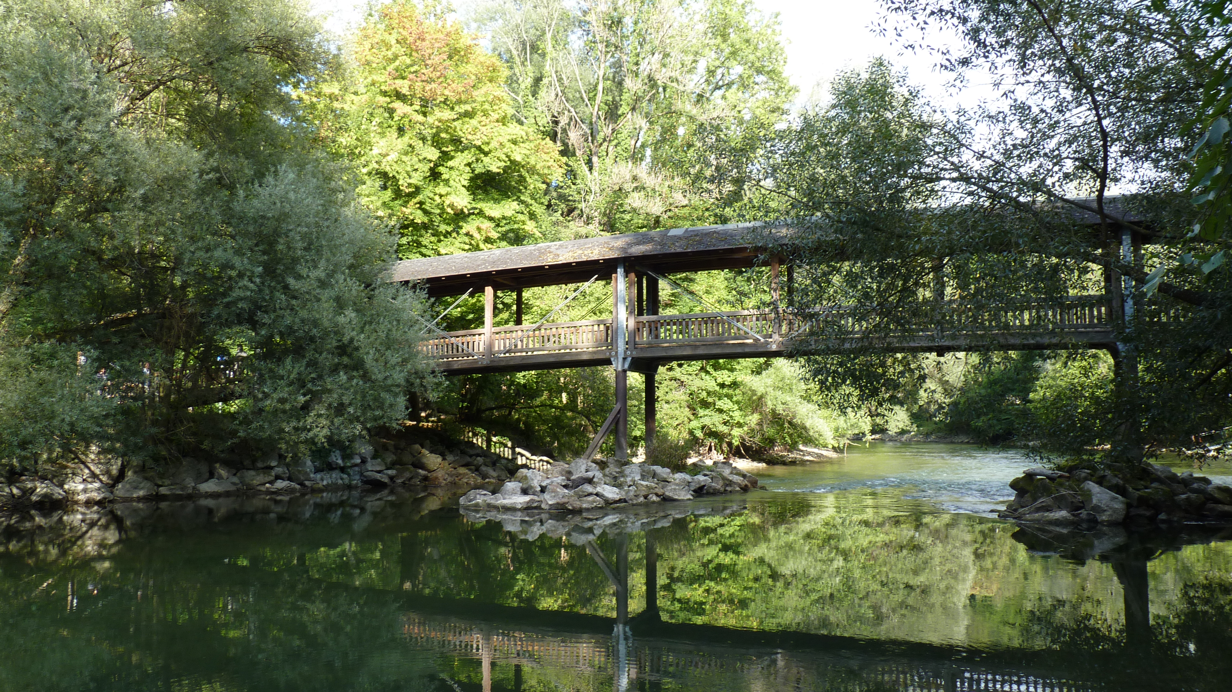 Steg über die Amper in Grafrath, Oberbayern/Deutschland